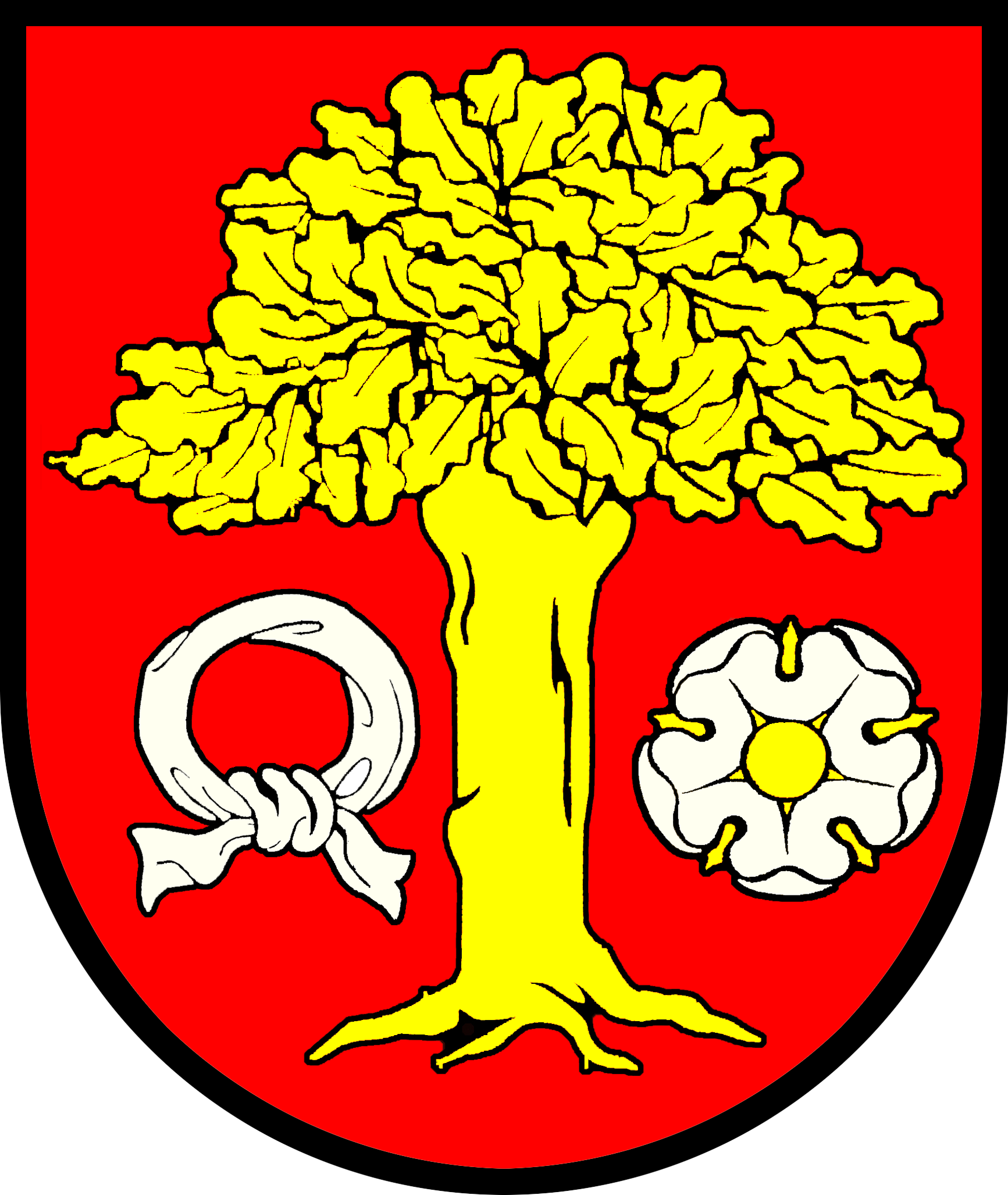 Jest to herb wsi sołeckiej Dębe w powiecie czarnkowsko-trzcianeckim